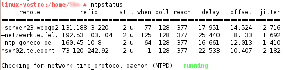 Output from ntpd (ntpq -p)